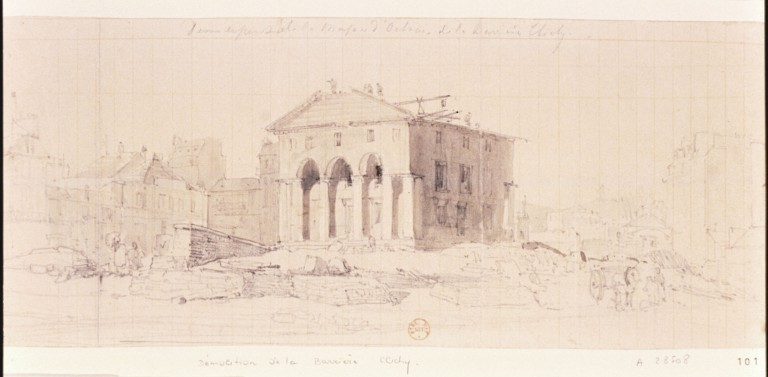 Démolition de la maison d'octroi de la barrière de Clichy (1860)